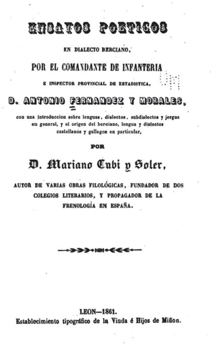 Primera página del libro: "Ensayos poéticos en dialecto berciano" de D. antonio Fernández y Morales, publicado en 1861